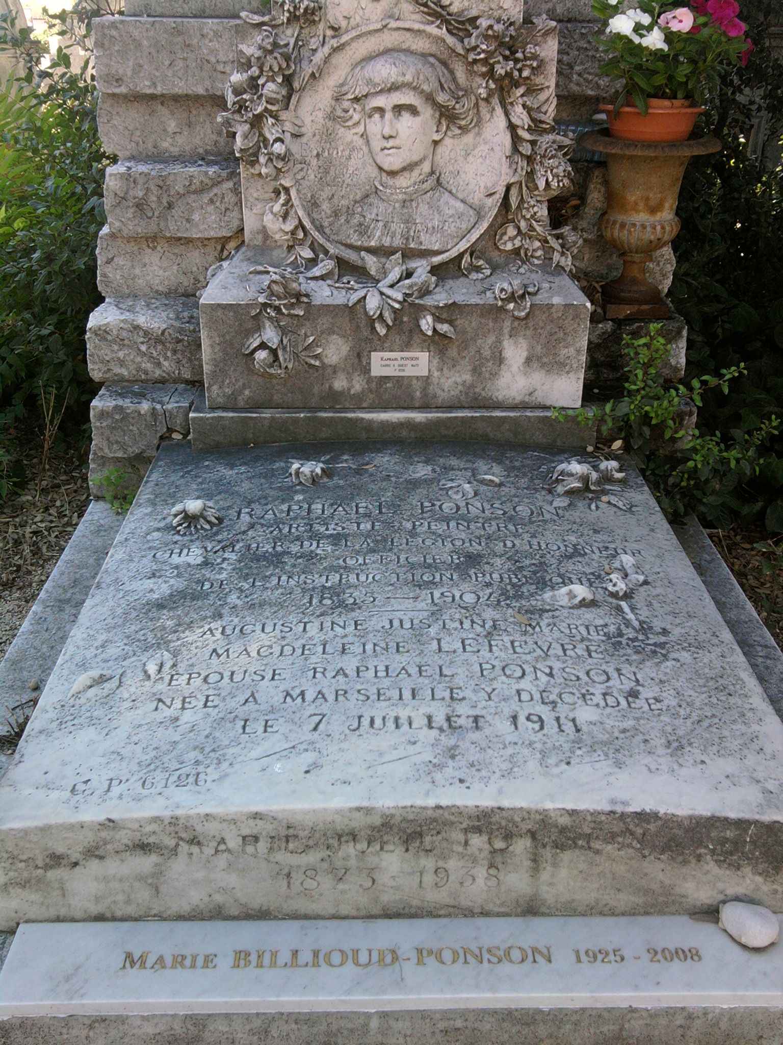 Tombeau de Raphaël Ponson au cimetière Saint Pierre de Marseille - Plaque pour Marie BILLIOUD-PONSON, fille adoptive de Marie Ponson